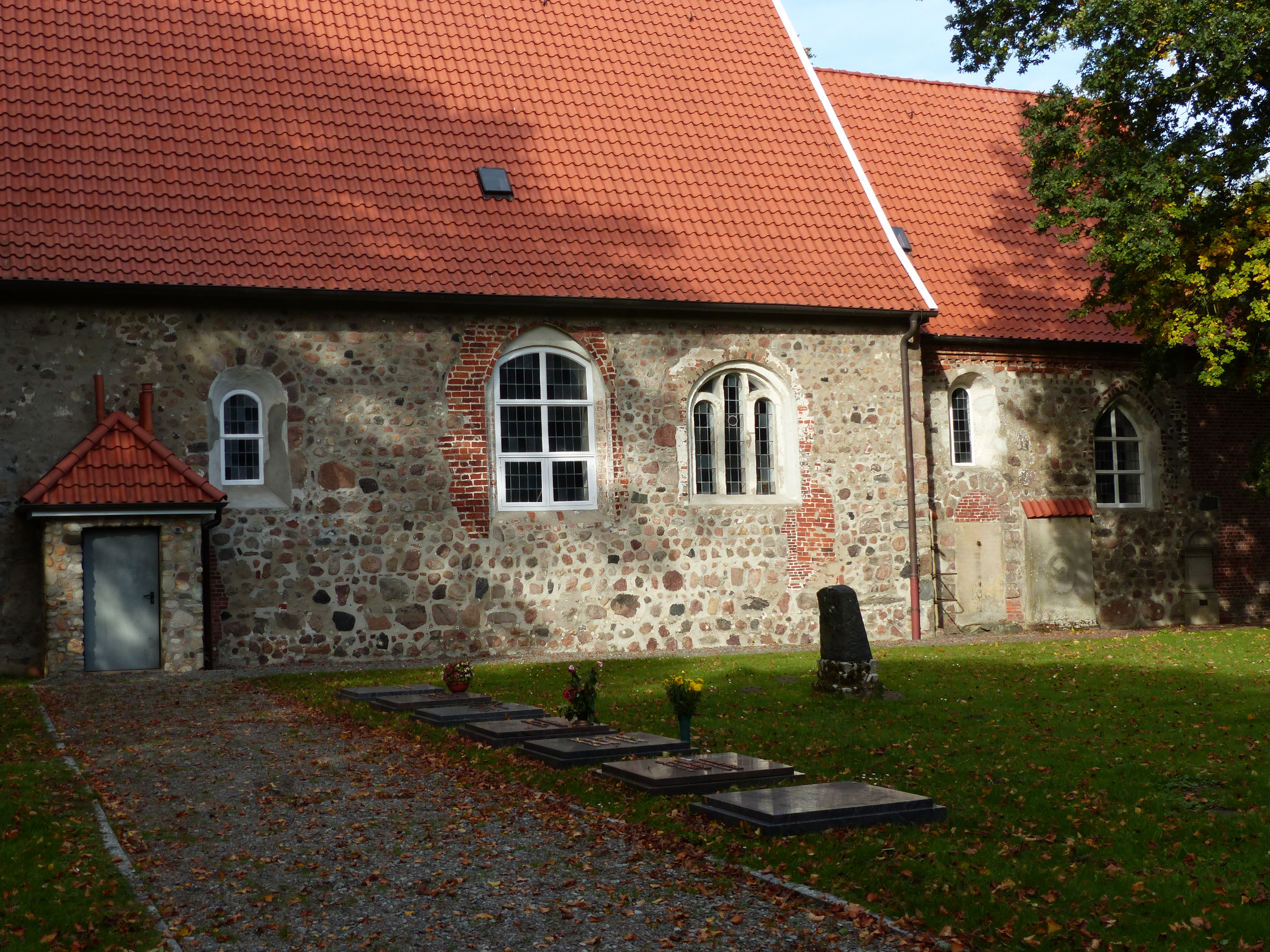 Nikolaikirche Nordleda, östliches Schiff und Chor von Süden